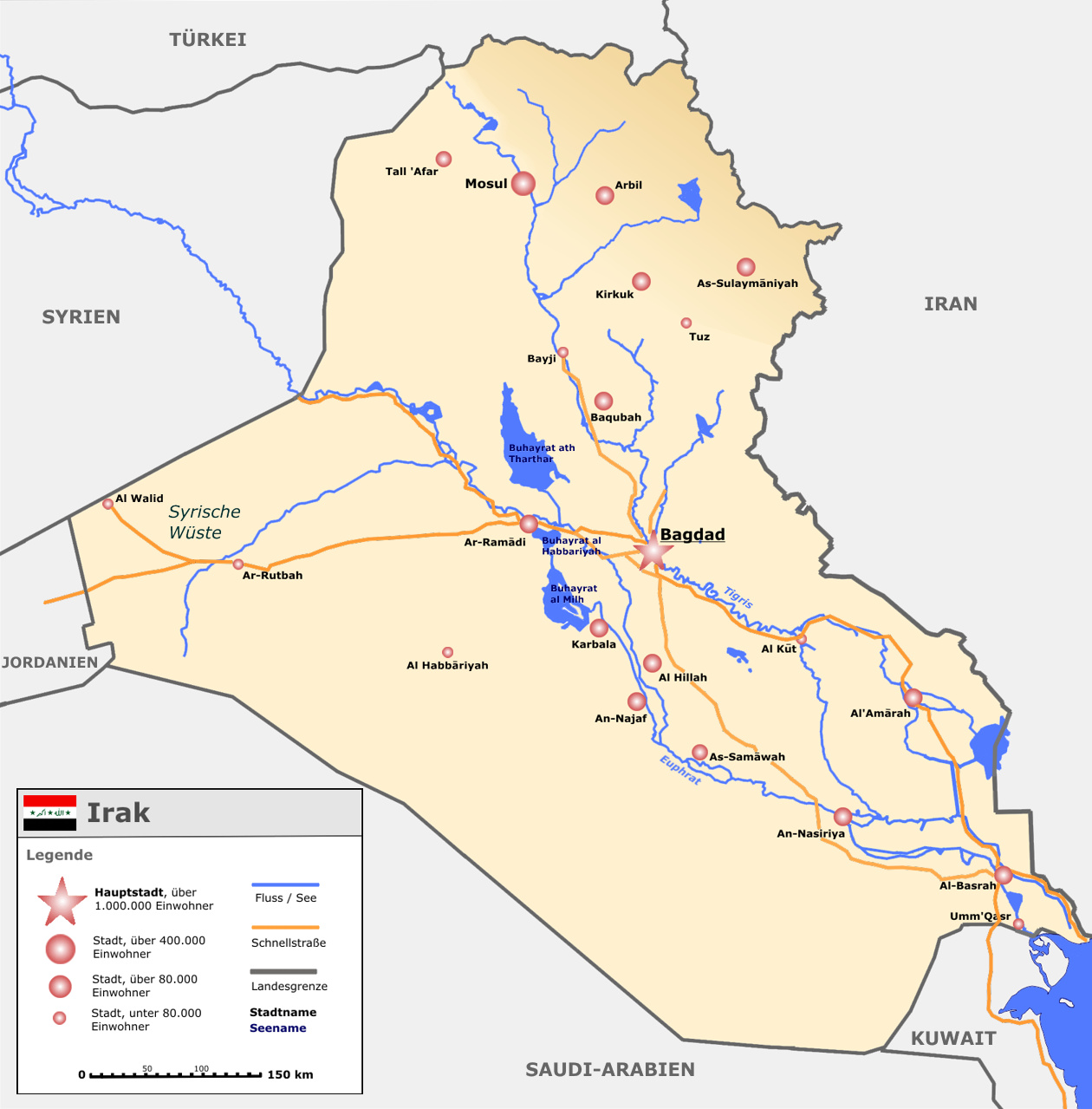 Karte des Irak